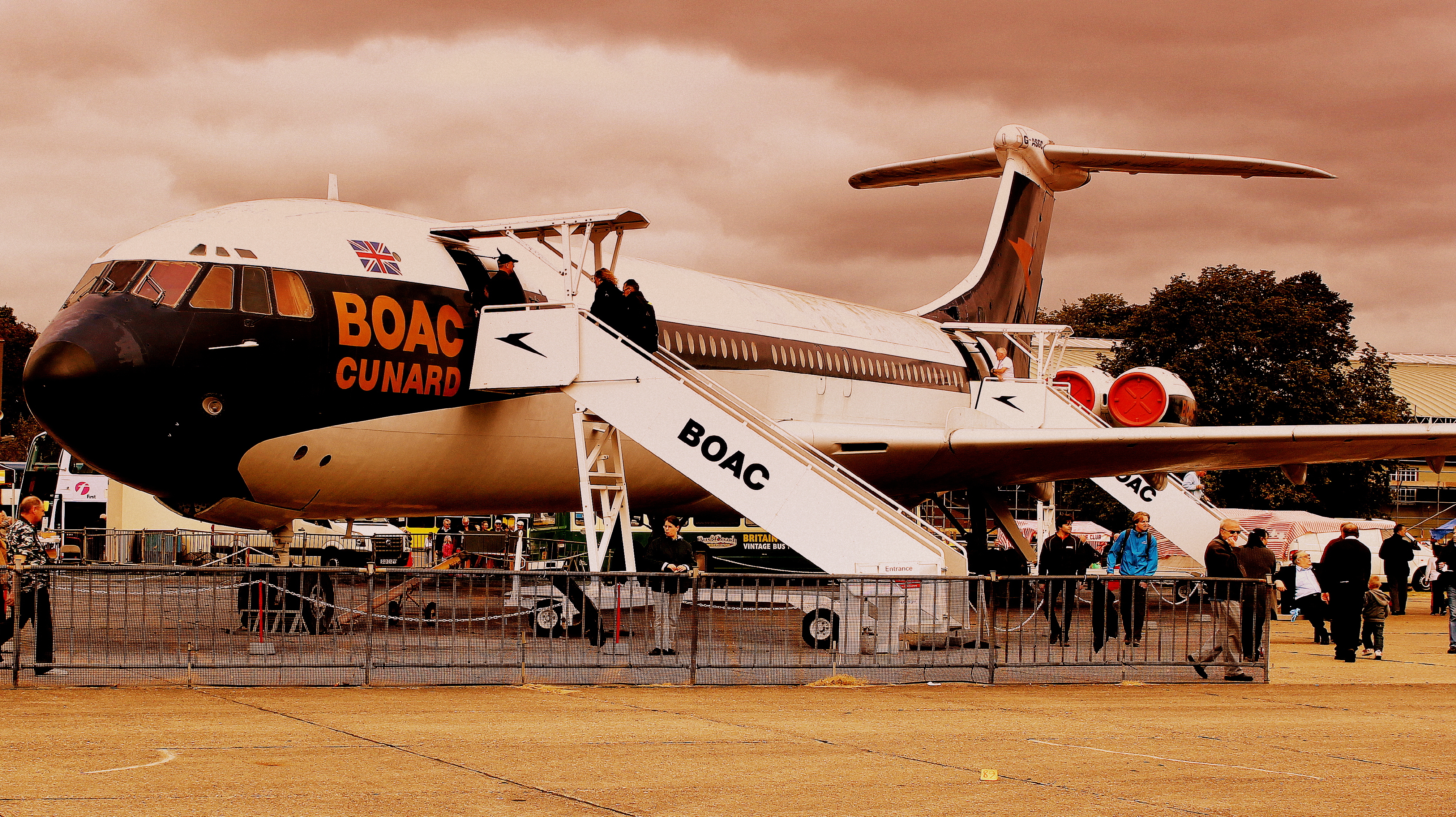 BOAC CUNARD SUPER VC10 DUXFORD SEP 2012